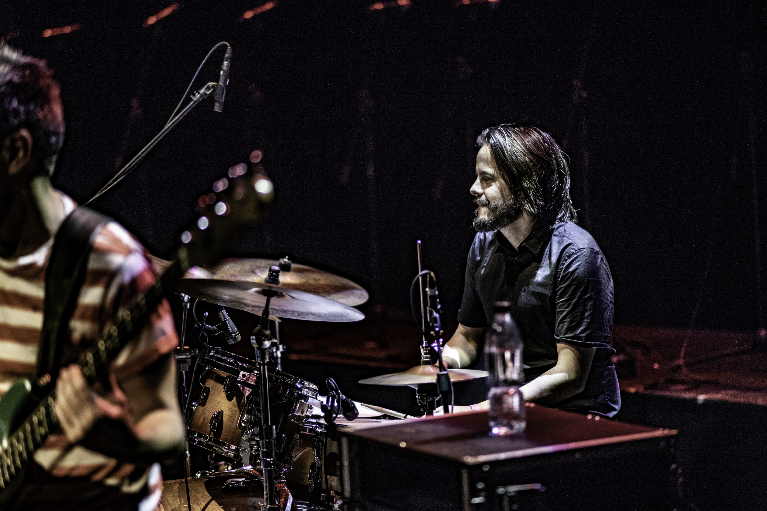 Fundación Gonzalo Rodríguez - Teatro Solís 6.11.2018 Esta noche, el artista pisará las tablas del Teatro Solís junto a sus Bochamakers (Martín Ibarburu en batería, Mateo Moreno en bajo, Herman Klang en teclados y Matías Rada en guitarra) y con Coralinas como invitadas, para repasar su amplio repertorio en un show a beneficio de la Fundación Gonzalo Rodríguez. Ref: Camera: Canon EOS 5D Mark IV Lens: Zeiss Makro-Planar T* 2/100 ZE 0 ISO: 800